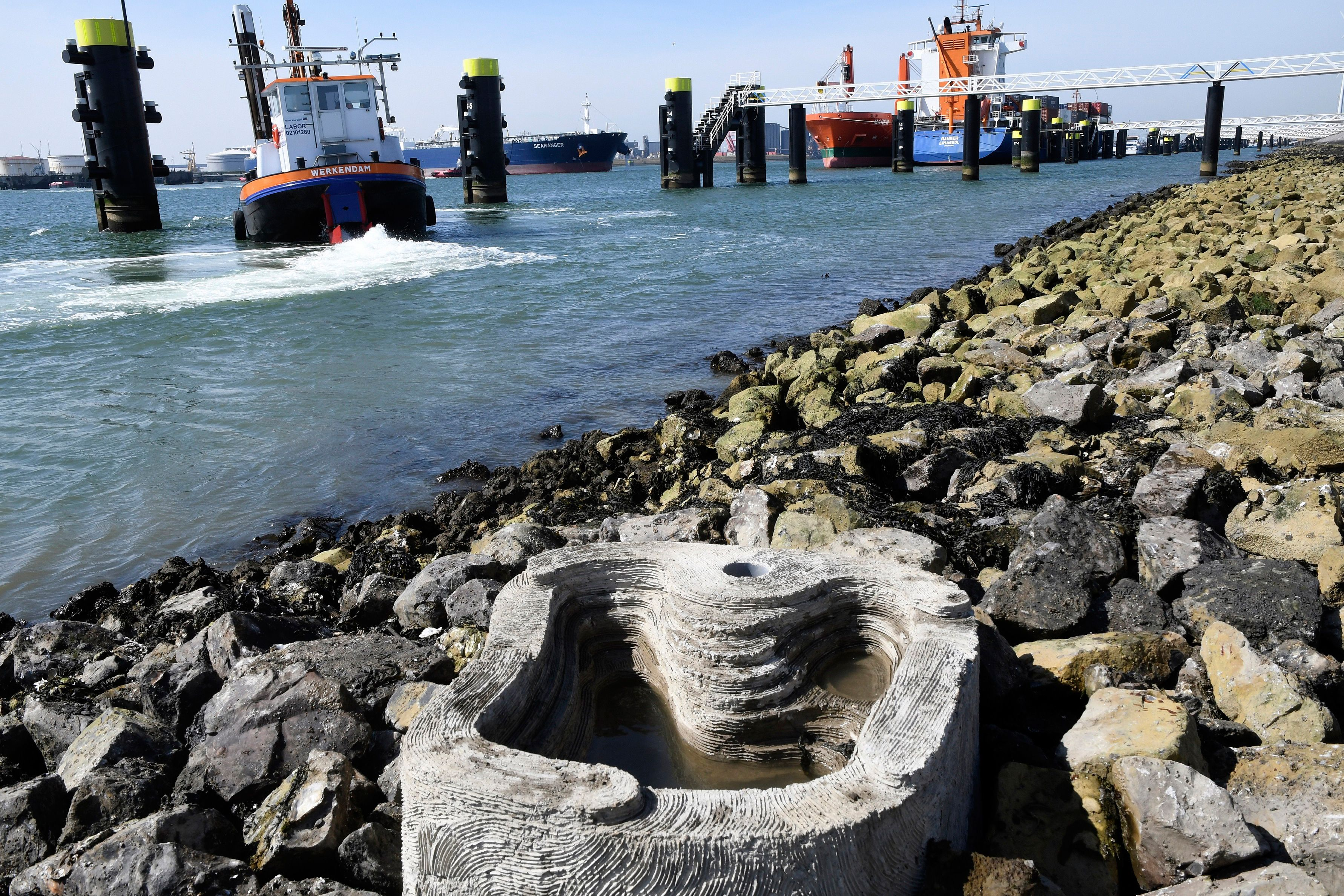 Oever van Calandkanaal (zijde Landtong Rozenburg) met een betonnen bak die daar gelegd is om dienst te doen als kunstmatige getijdenpoel. In het kanaal meerpalen en vaartuigen.